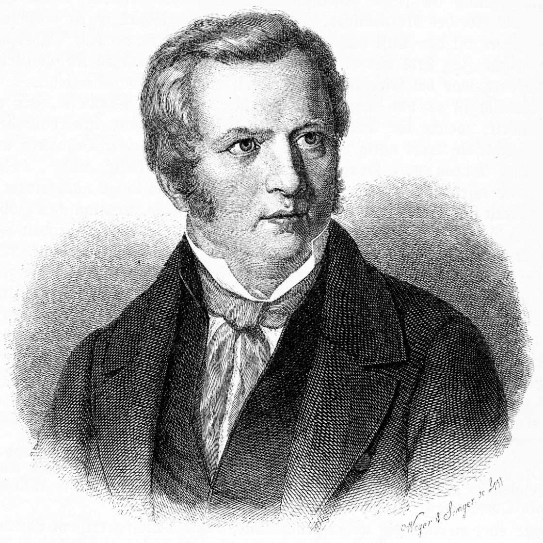 Gustav Schwab. Kupferstich von August Weger und Singer nach einem Stich von Carl Barth